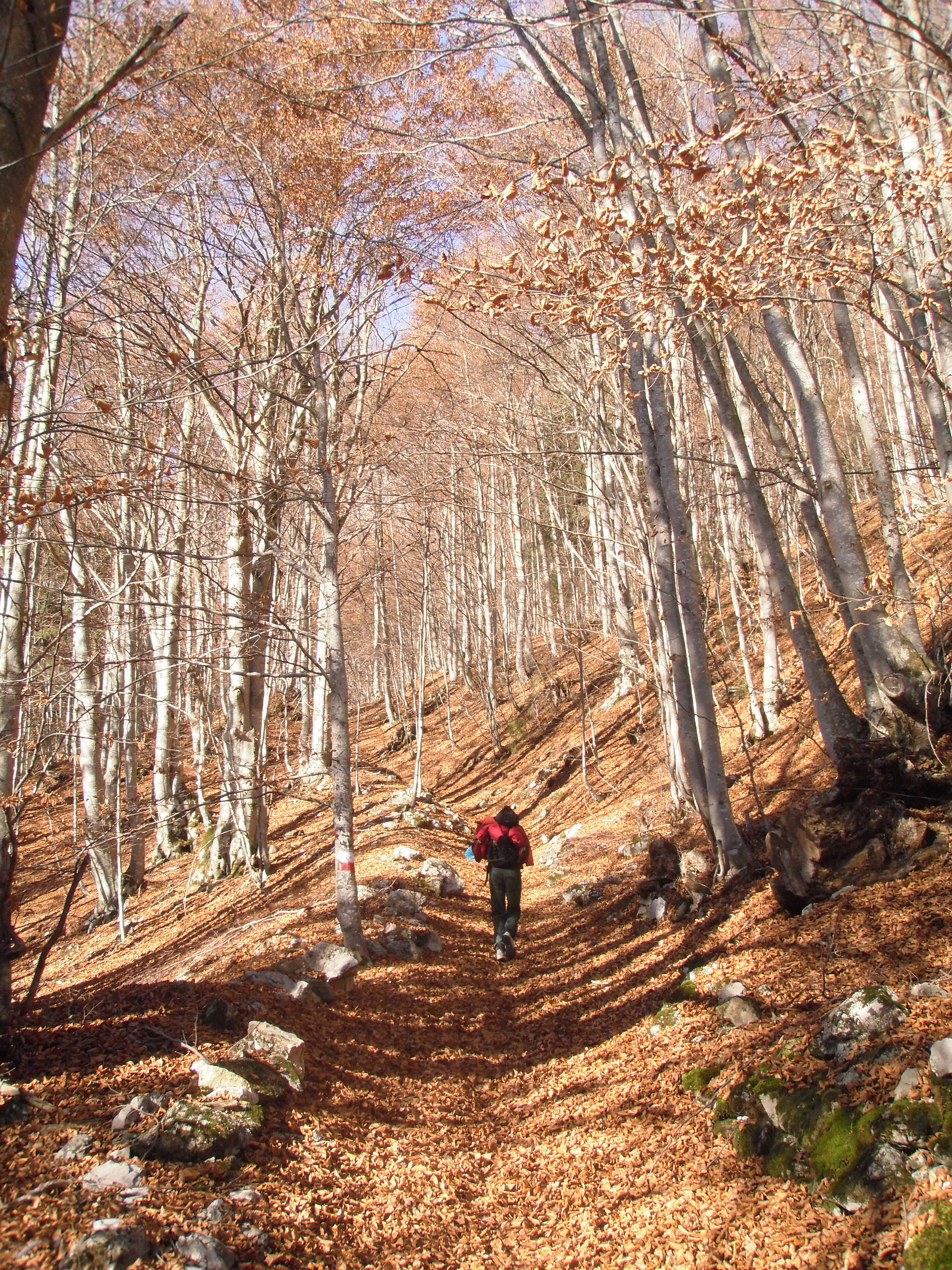 Faggeta secolare di Sottoguda nelle Dolomiti